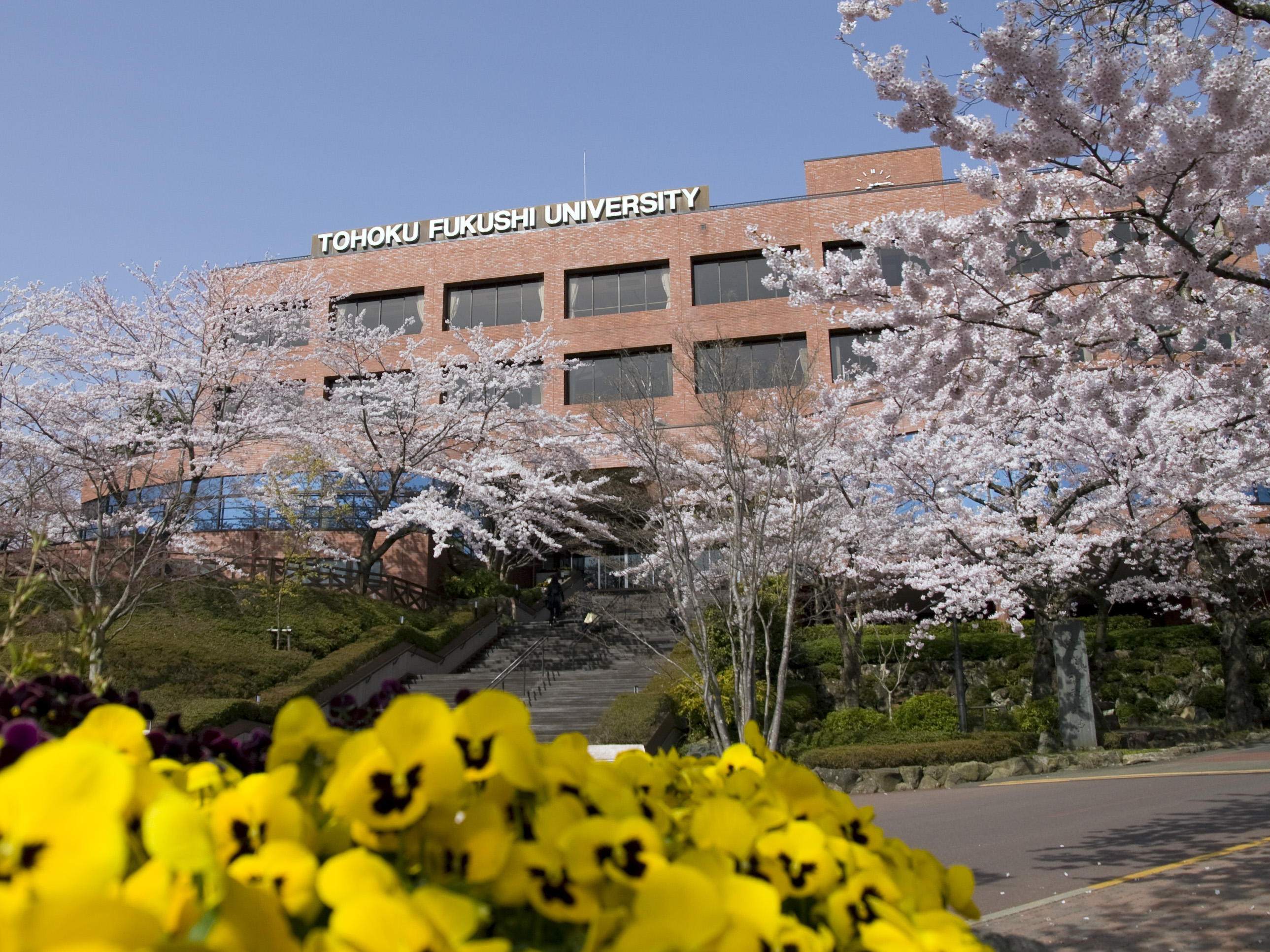 東北福祉大学国見キャンパスにある管理棟と桜の写真